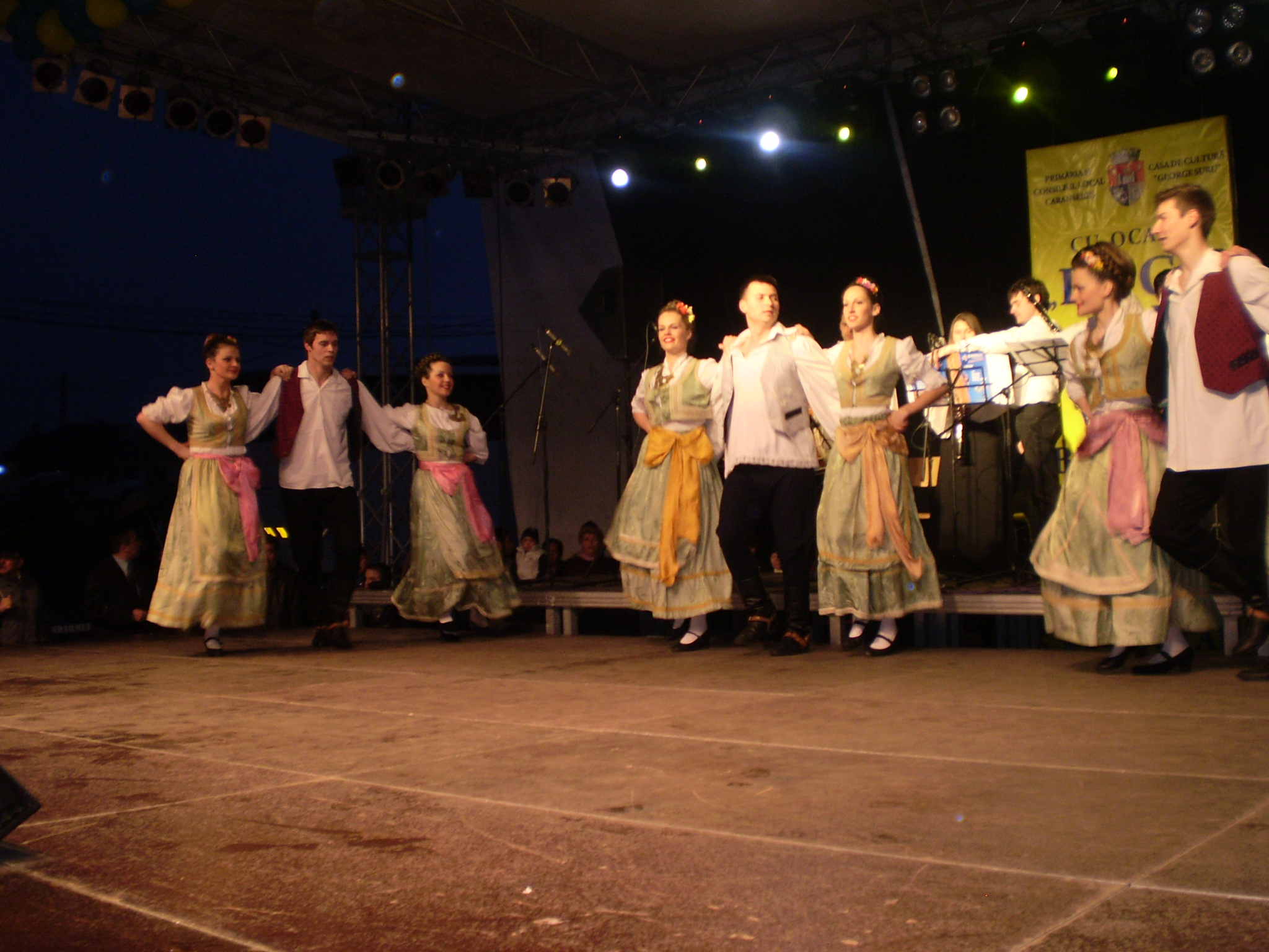 Koncert u Karansebešu (Rumunija)